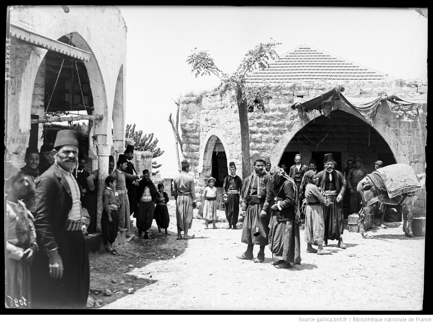 تظهر الصورة قرية لبنانية ويظهر فيها أزياء تقليدية للسكان الصورة ملتقطة في 11 مايو 1893 المصور أندريه سالس